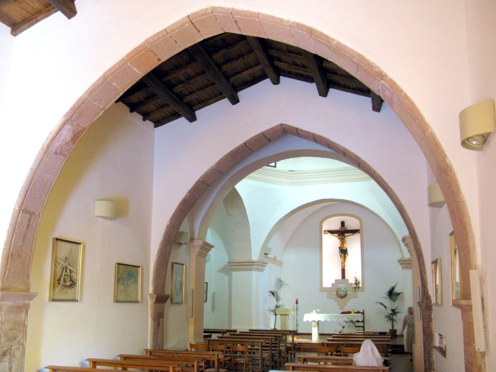 interno della chiesa di Su Serbadore